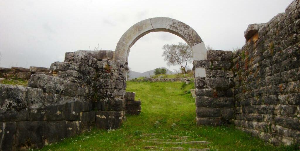 Αρχαία Φανοτή, Κεντρική Πύλη